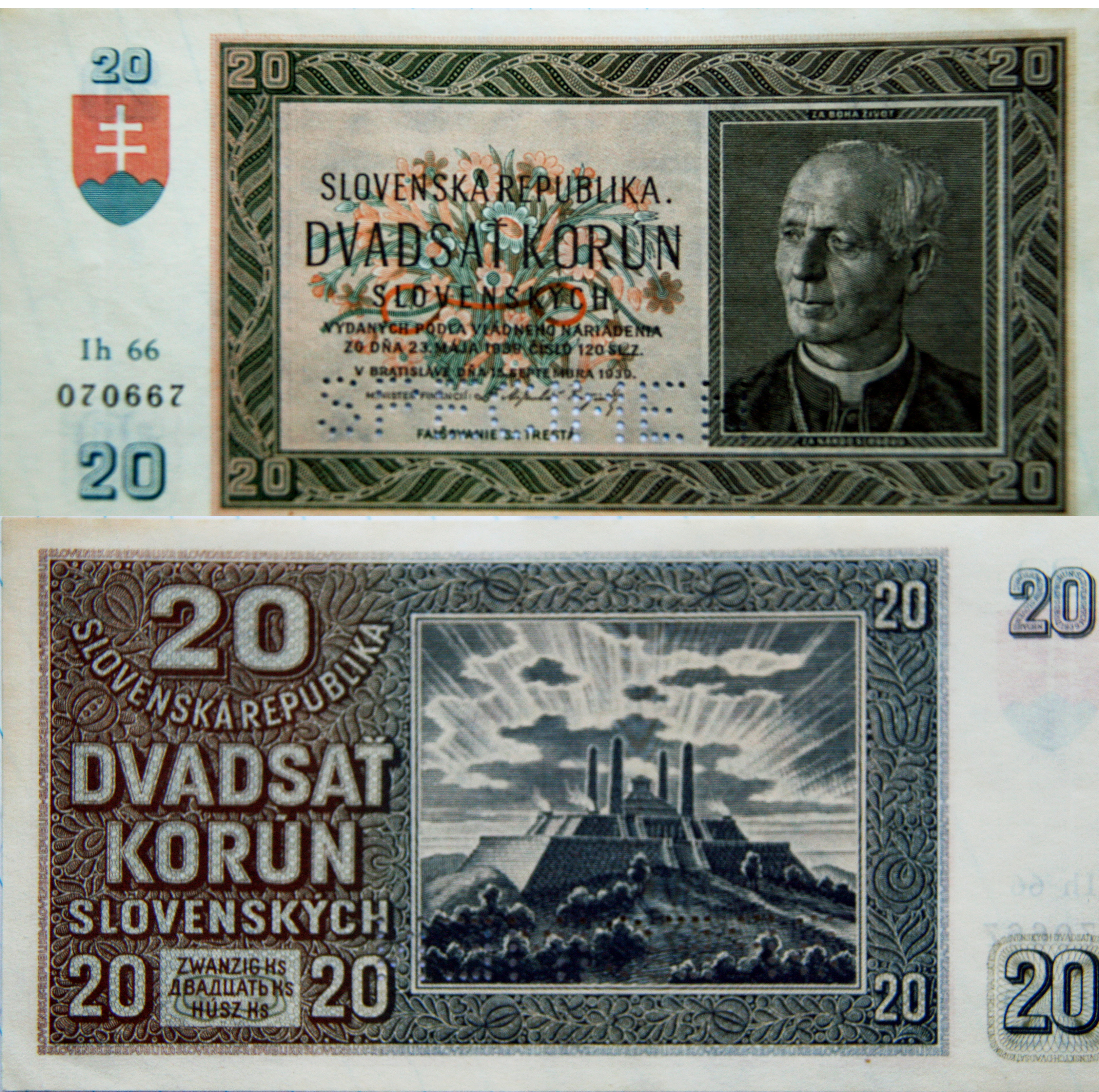 Dvadsaťkorunáčka. 20 korún slovenských z roku 1939 (obdobie vojnovej Slovenskej republiky 1939). Averz: v ornamentálnom ráme vľavo nápis SLOVENSKÁ REPUBLIKA / DVADSAŤ KORÚN / SLOVENSKÝCH /VYDANÝCH PODĽA VLÁDNEHO NARIADENIA / ZO DŇA 23. MÁJA 1939 ČÍSLO 120 SL.Z./ V BRATISLAVE DŇA 15. SEPTEMBRA 1939/... Vpravo obraz Andreja Hlinku zľava. Vľavo na bielom okraji slovenský štátny znak. Reverz: v ornamentálnom orámovaní obraz mohyly M. R: Štefánika na Bradle. Vľavo označenie hodnoty 20 / SLOVENSKÁ REPUBLIKA / DVADSAŤ /KORÚN / SLOVENSKÝCH.